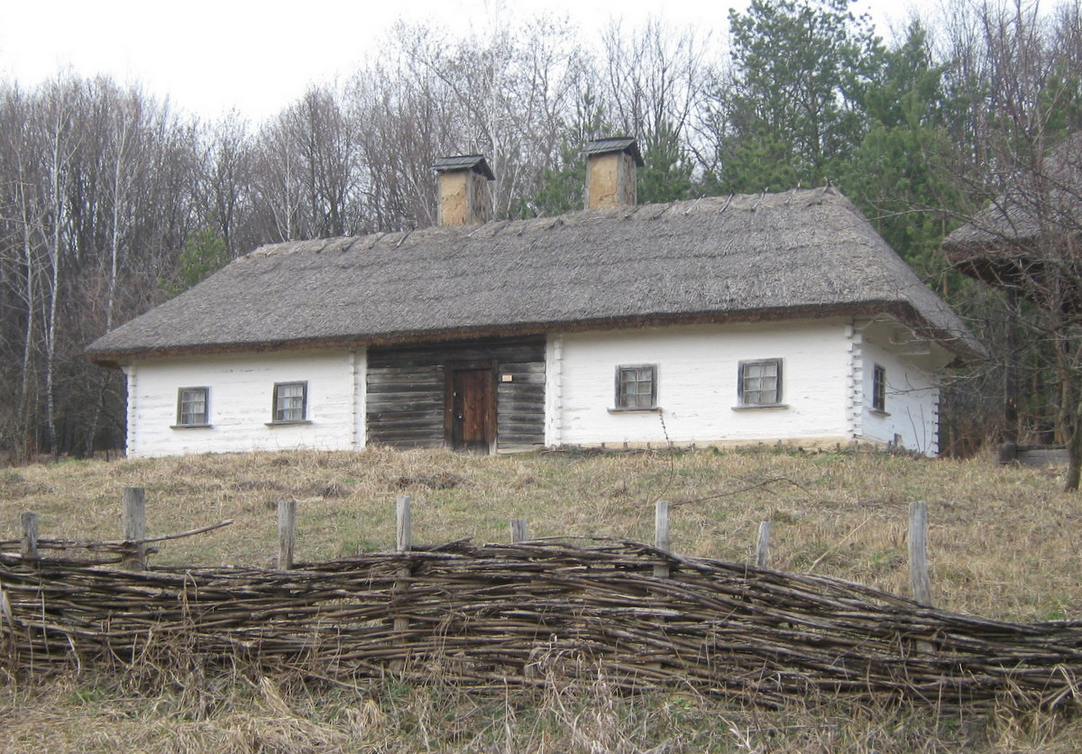 Хата з с. Мала Каратуль Преяслав-Хмельницького р-ну Київської обл.